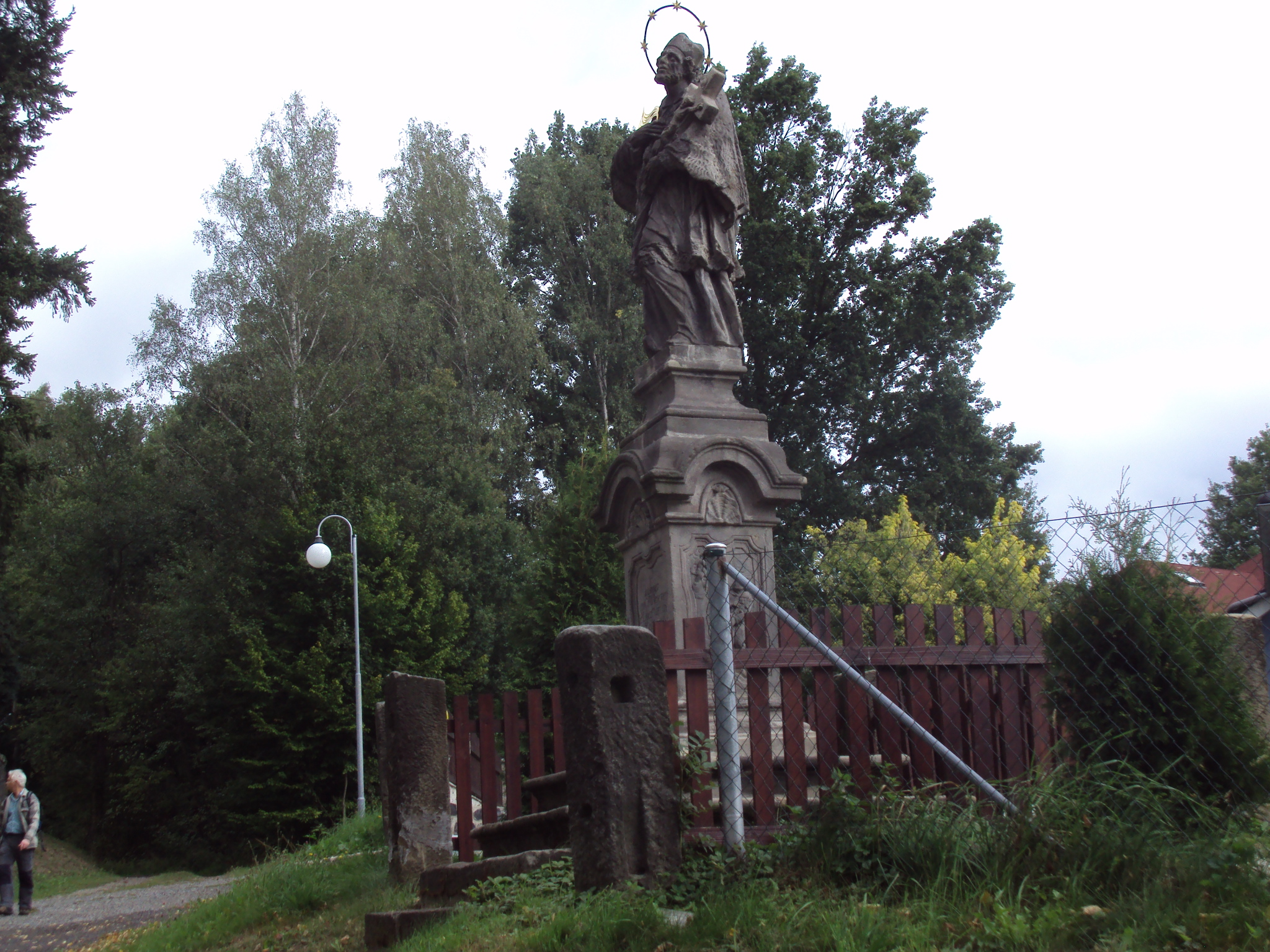 Asi 15 metrů od kostela je socha